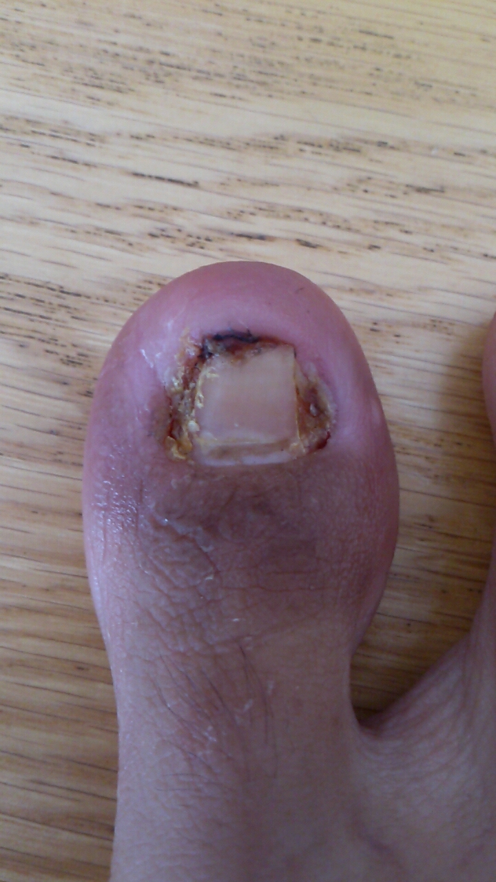 陥入爪の手術後。しばらく包帯に巻かれましたが完治後の写真。